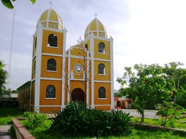 Fotografía tomada de la fachada de la iglesia San Fernando Rey del municipio colombiano de San Fernando de Occidente, en el departamento de Bolívar.